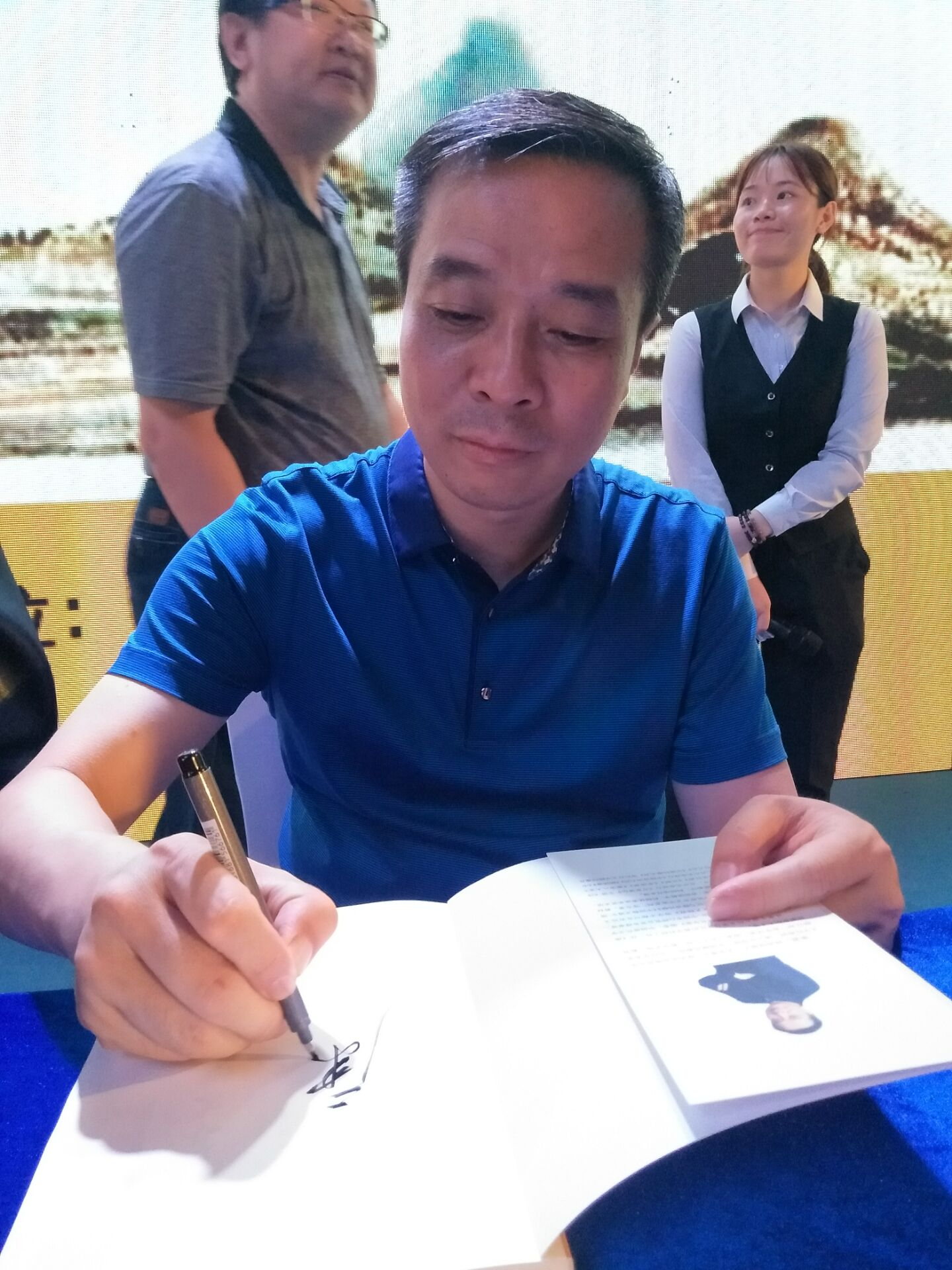 康震在深圳市龙岗区的签售会上，2018年7月18日